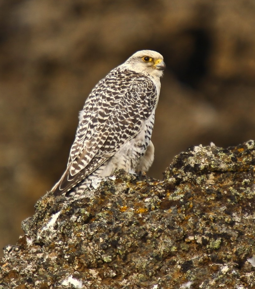 Fálki (Falco rusticolus) - Gyr Falcon